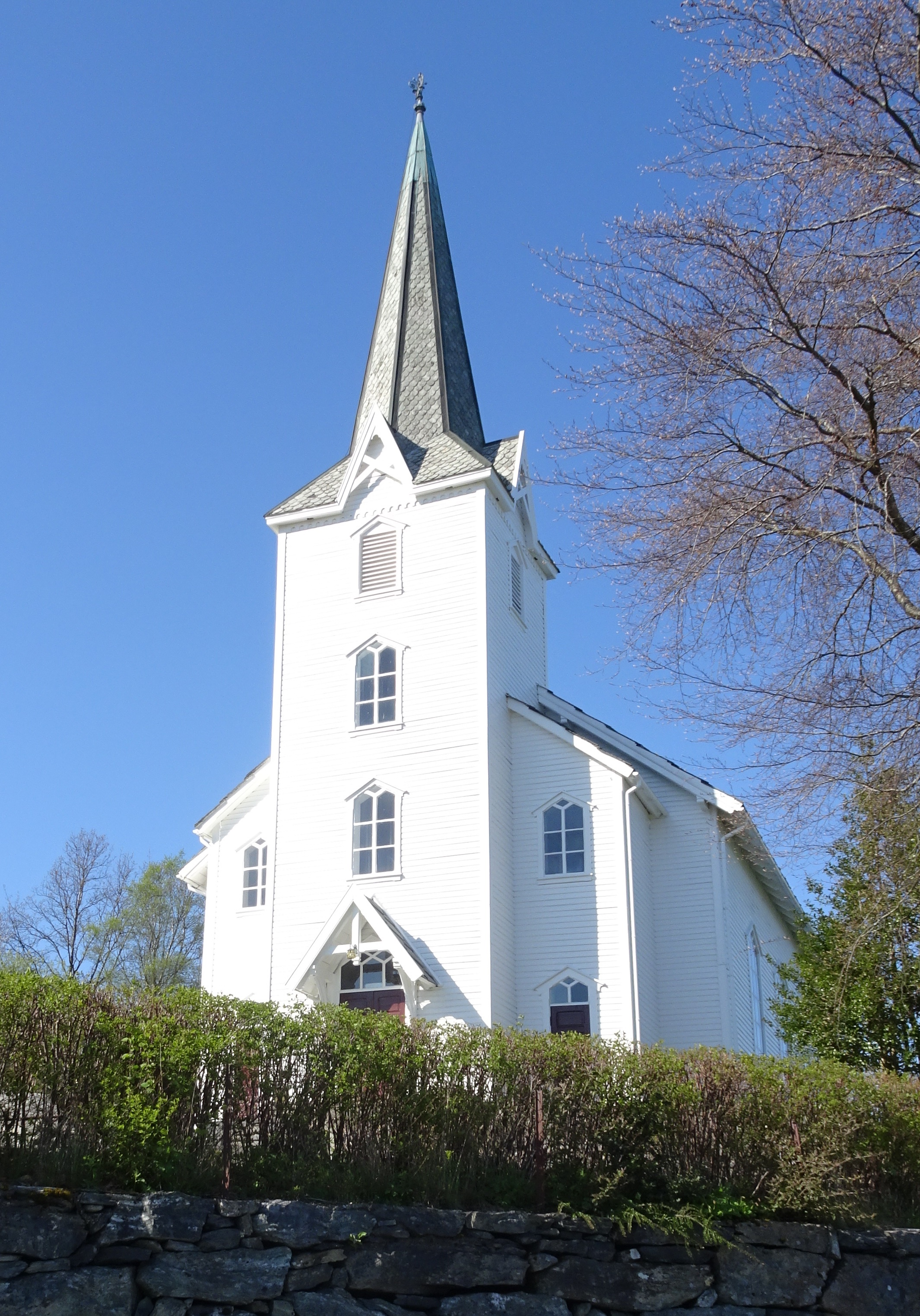 Onarheim kirke